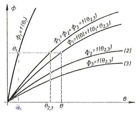 Figura 6. Karaterstikat e qarkut magnetic të përbërë sipas figurës 5.